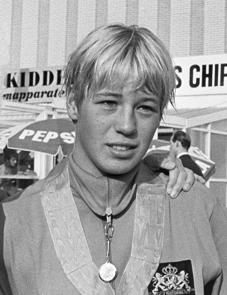 Europese Zwemkampioenschappen vrije slag, Mirjam van Hemert